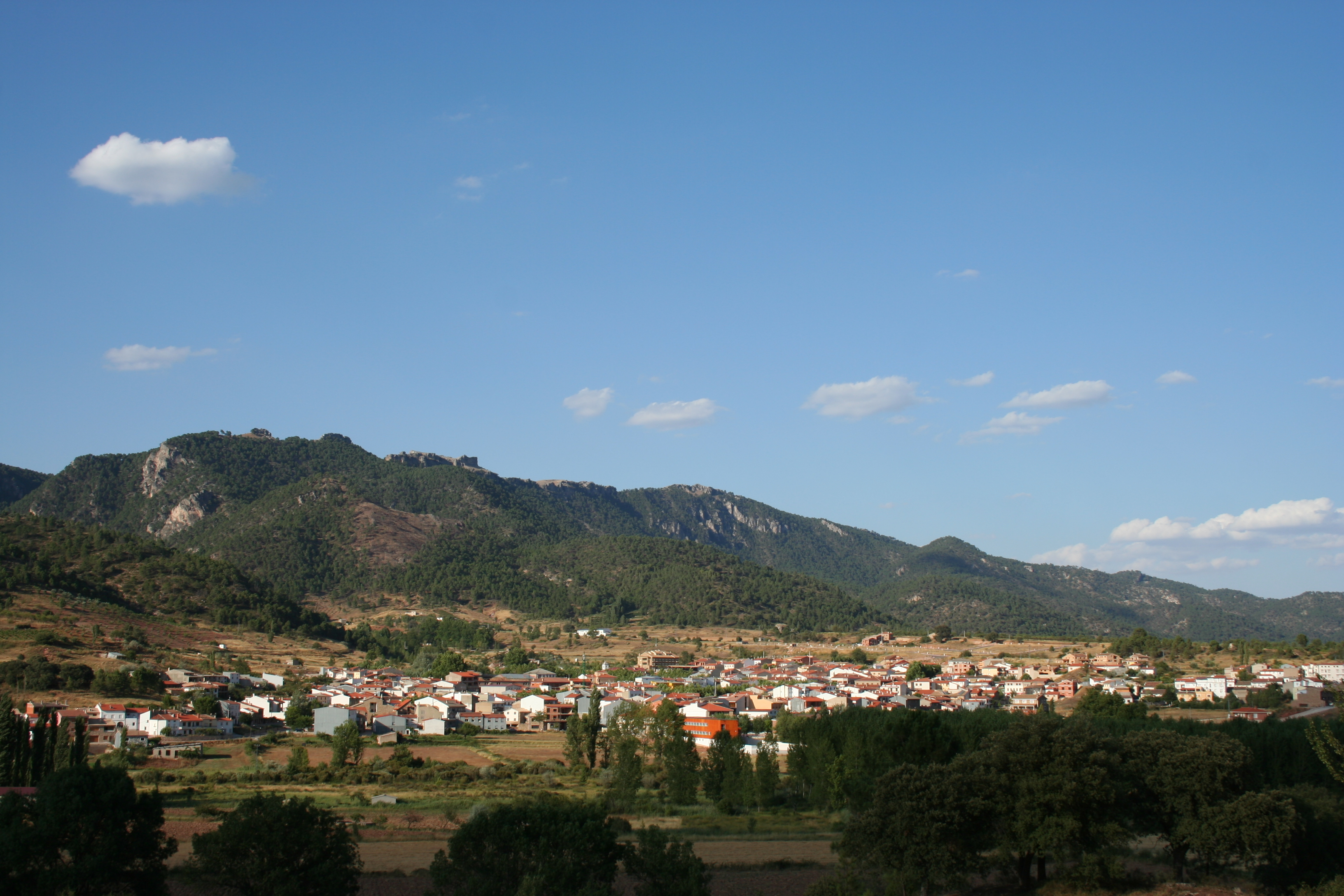 Riópar